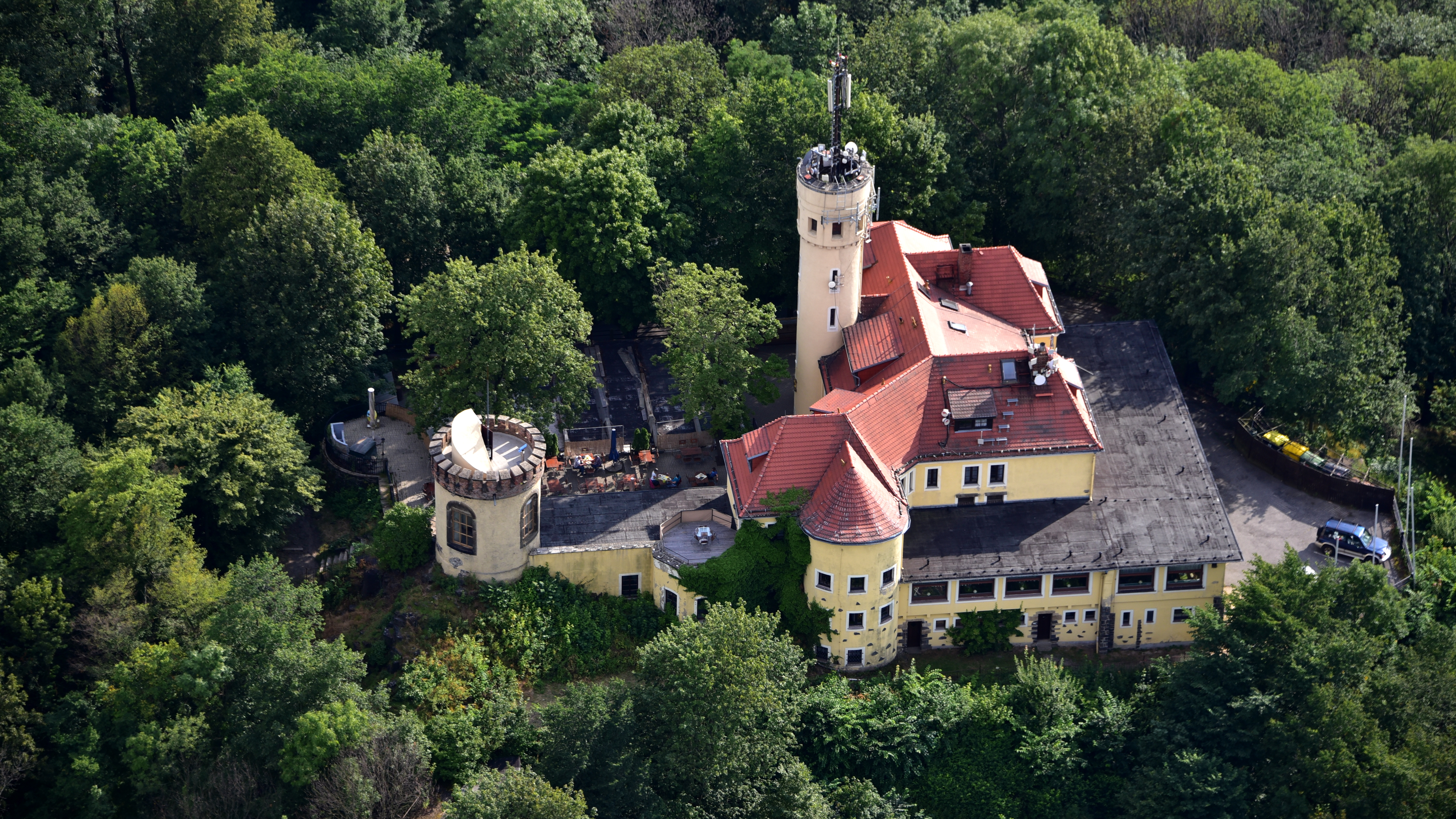 Görlitz, Landeskrone, Luftaufnahme (2019)